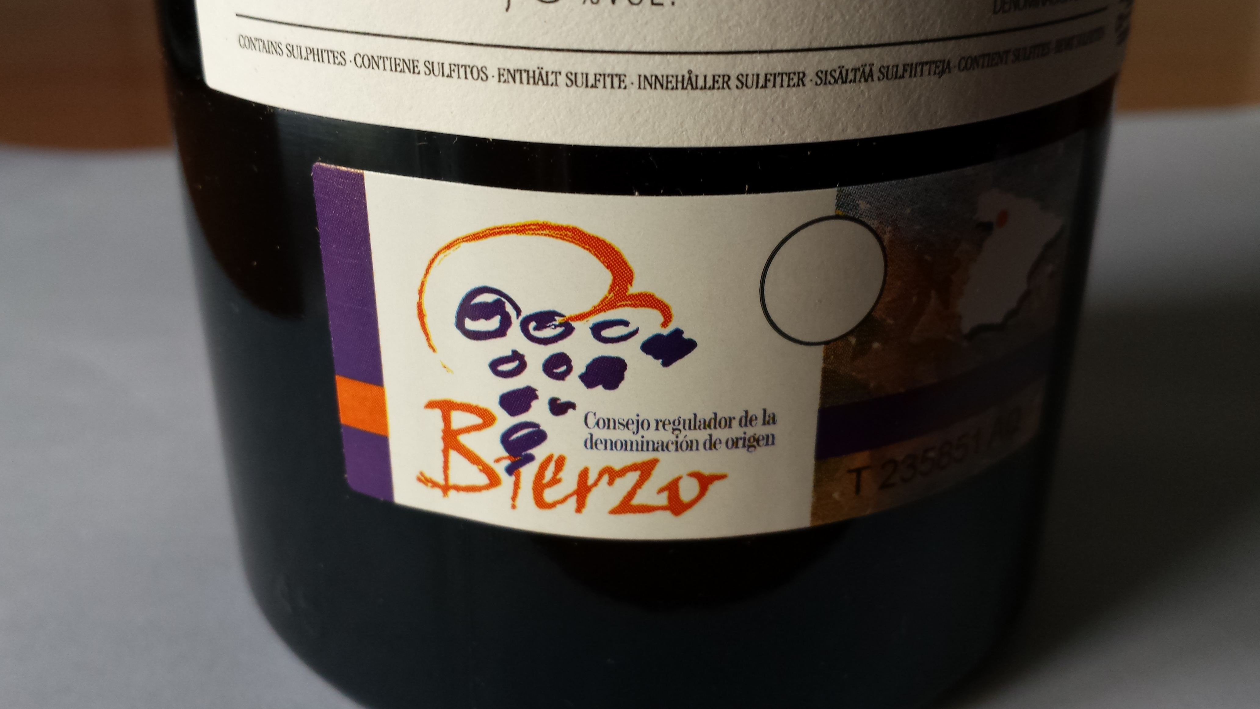 Etiqueta de vino de la DO Bierzo. León, España